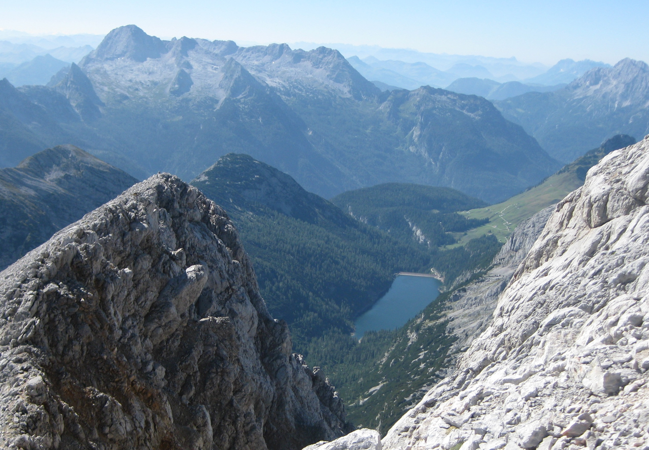 Dießbachstausee in den Berchtesgadener Alpen, gesehen vom Hundstod. Dahinter die Leoganger Steinberge.